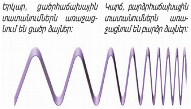 Ալիքներ